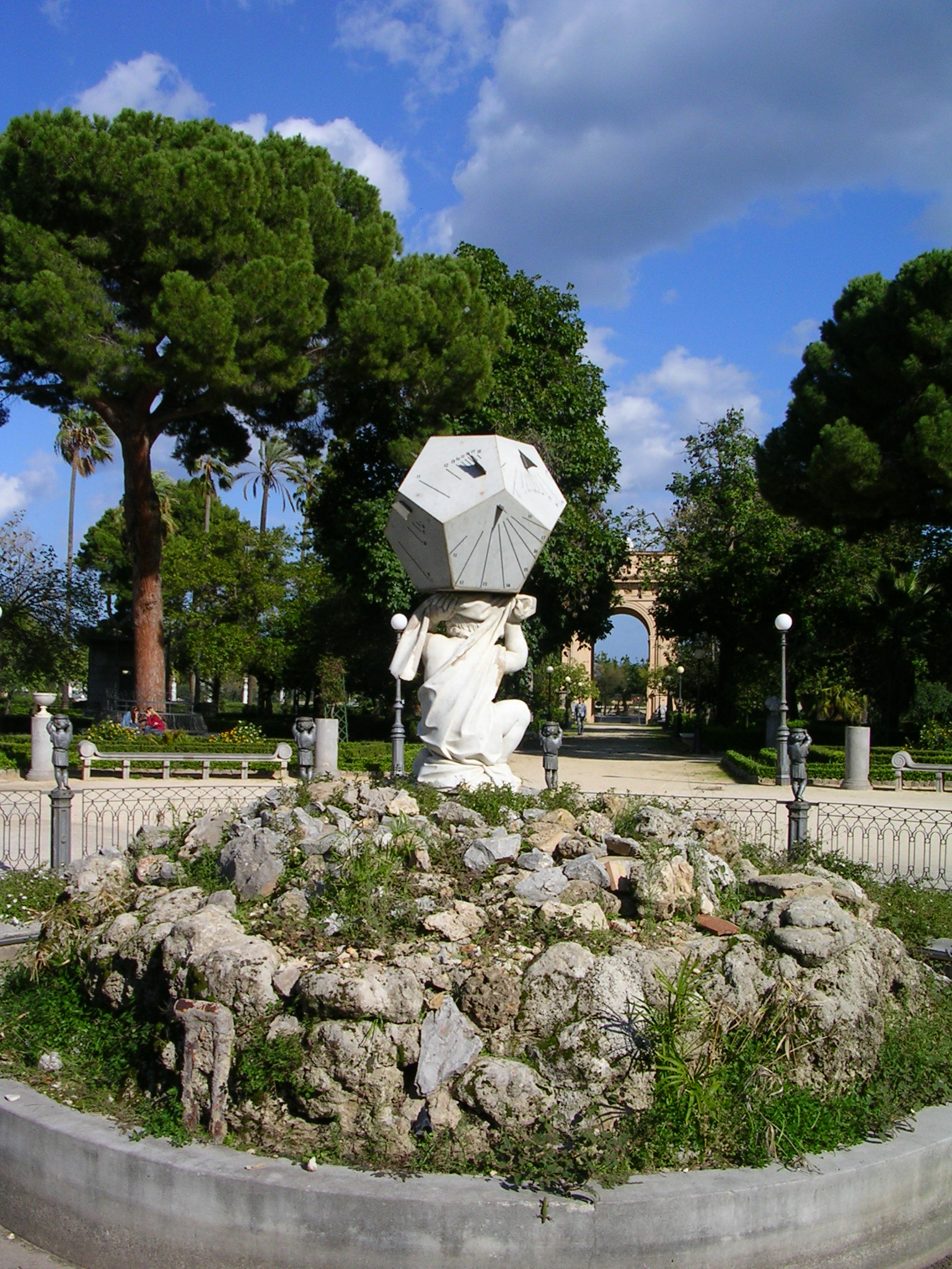 L'Orologio del Dodecaedro - Villa Giulia - Palermo - Italy